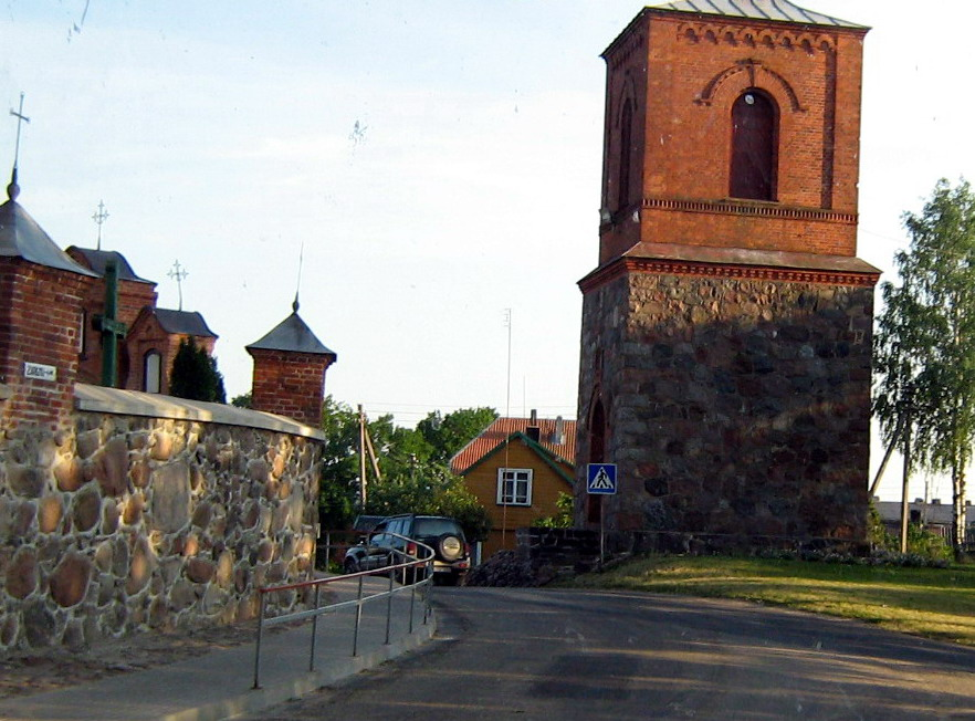 Tverų Švč. Mergelės Marijos Apsilankymo bažnyčia Foto: Algirdas, 2007-06-12